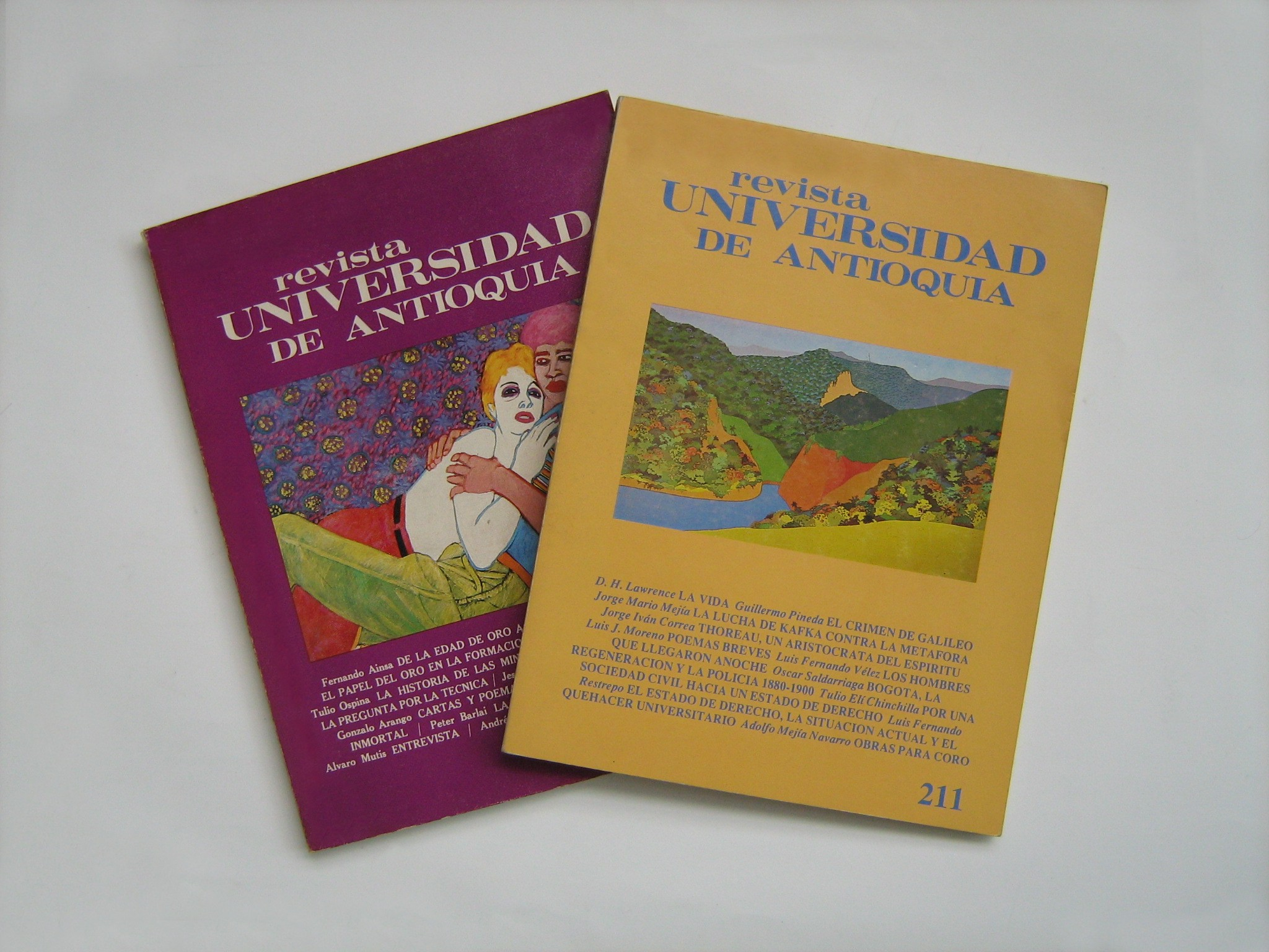 Foto de Revistas Universidad de Antioquia, Colombia.